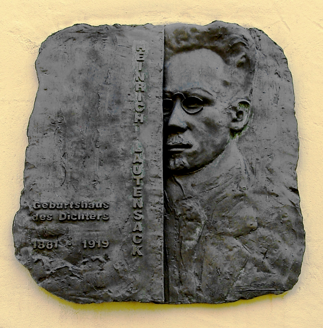 Gedenktafel an der Fassade seines Geburtshauses in Vilshofen an der Donau.